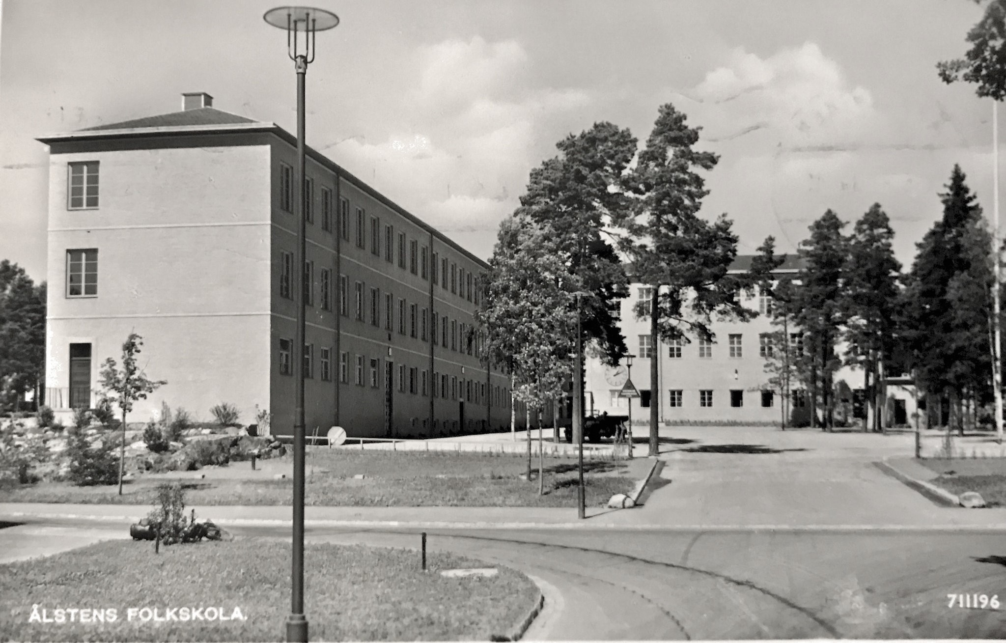 Ålstens folkskola, Nyängsvägen 72-80, Ålsten, Bromma, Stockholm. Skolans arkitekt var Ture Ryberg, byggår var 1928, skolan invigd 1929.